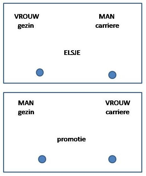 Voorbeeld IAT